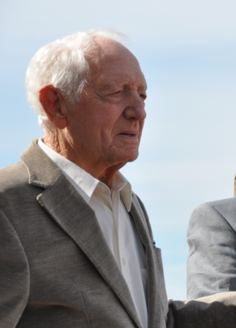 Marc CASSOT à Autignac le 26 avril 2014.